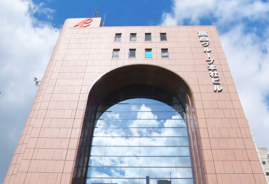 倉商本社ビル